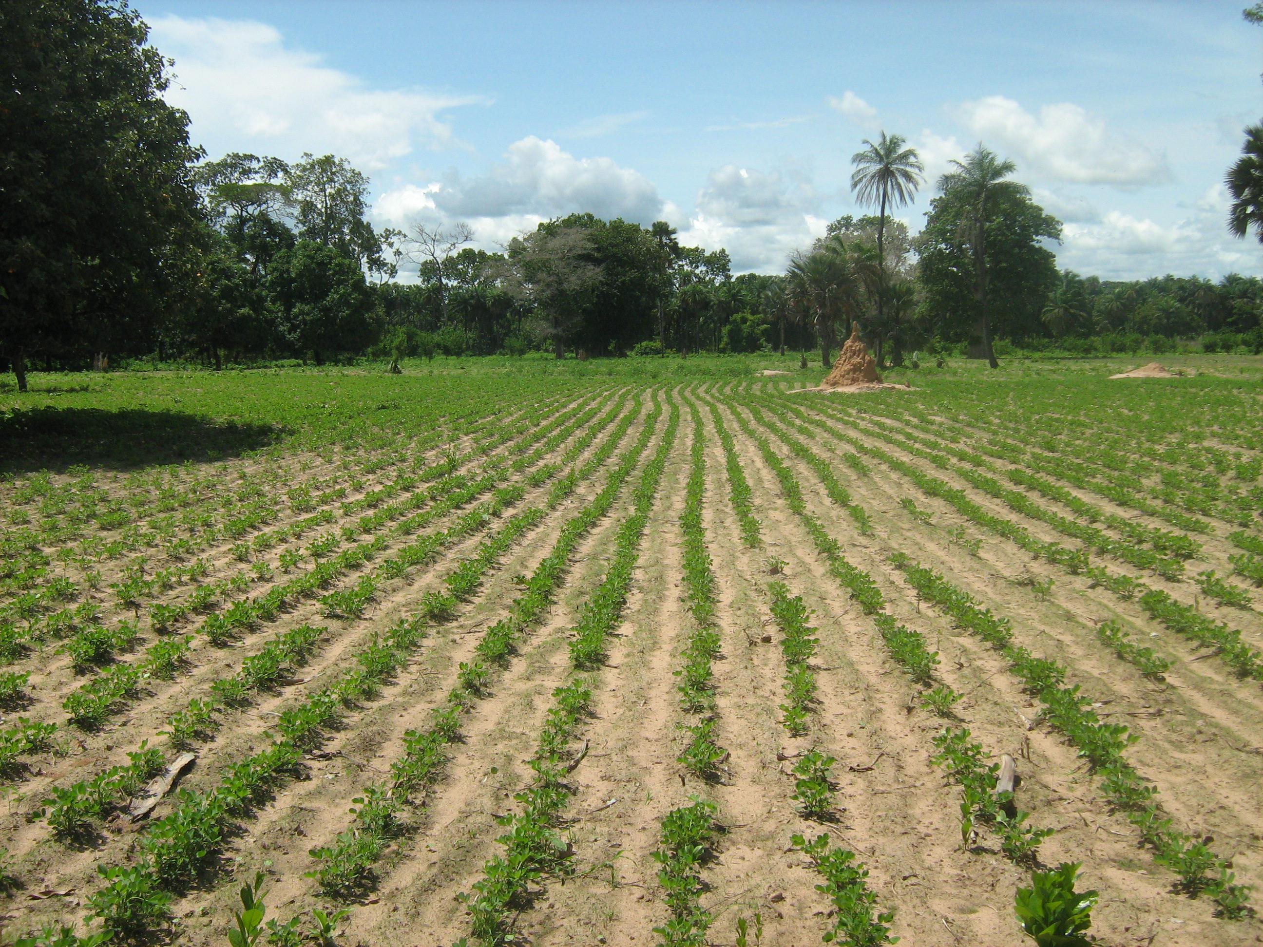 L'arachide est beaucoup cultivée au Sénégal depuis la colonisation. This is an image of food from Senegal